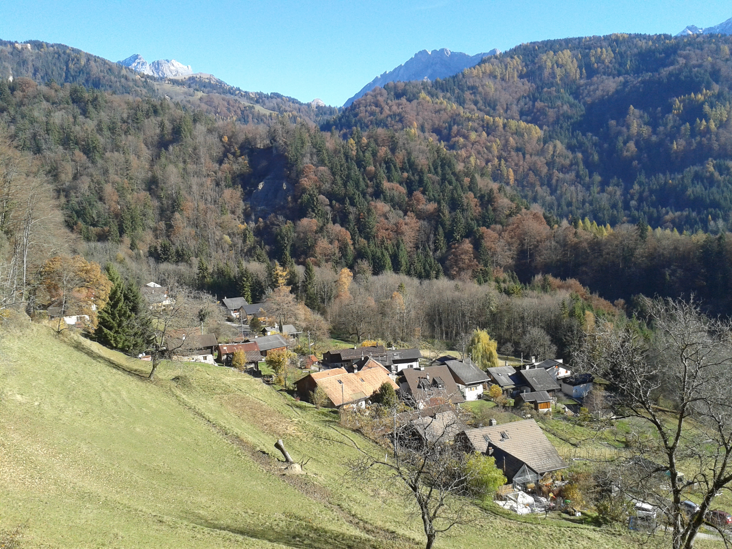 Vue de village depuis Auliens.